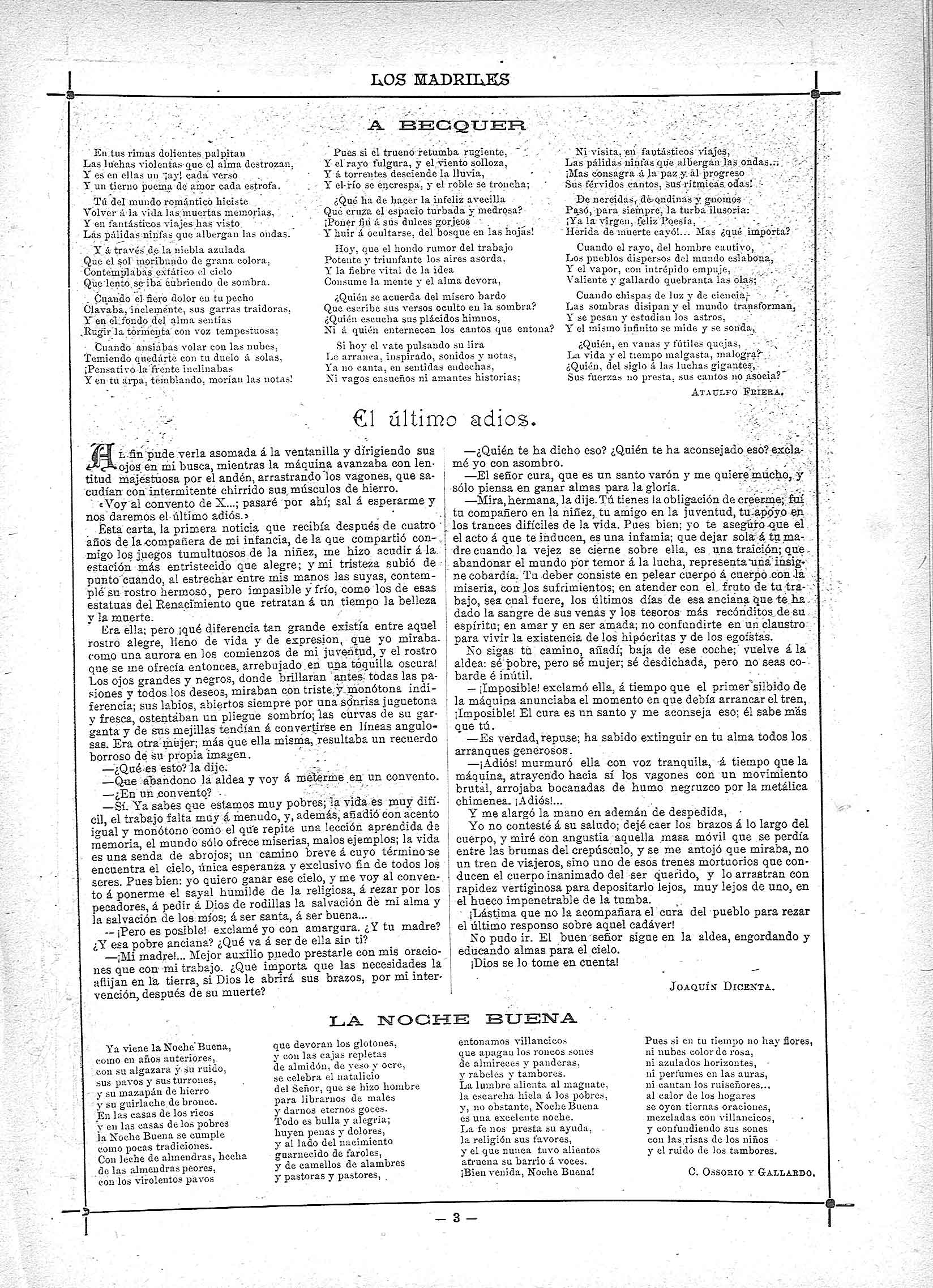 Página 3 del número del 21 de diciembre de 1889 de la revista Los Madriles.